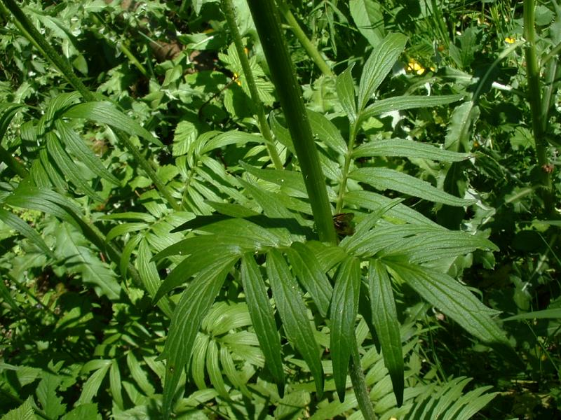 Valériane officinale (feuilles), photo J.F. Gaffard, Bucey-lès-Gy, juin 2004